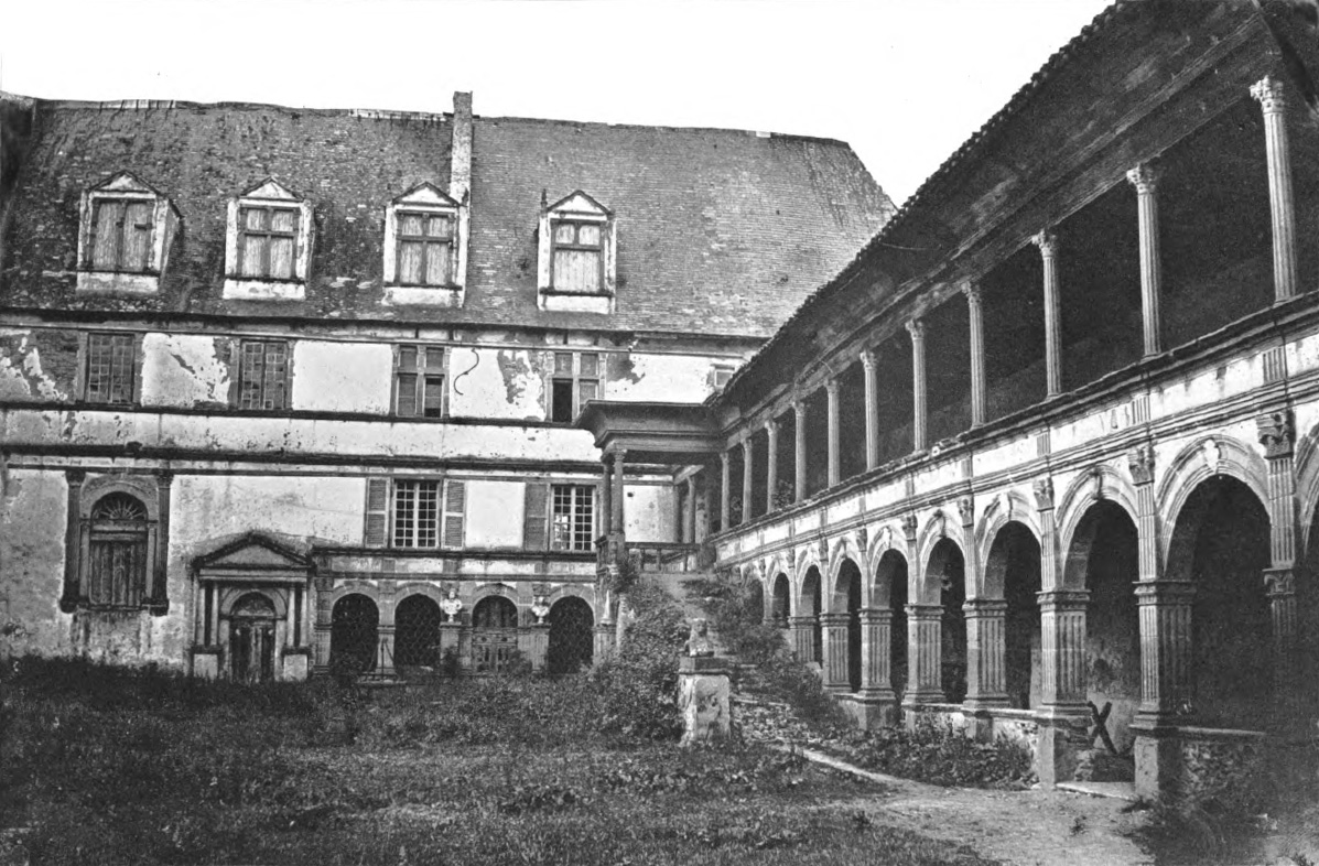 Westflügel und Logis des Schlosses La Bastie d'Urfé, Loire, Frankreich